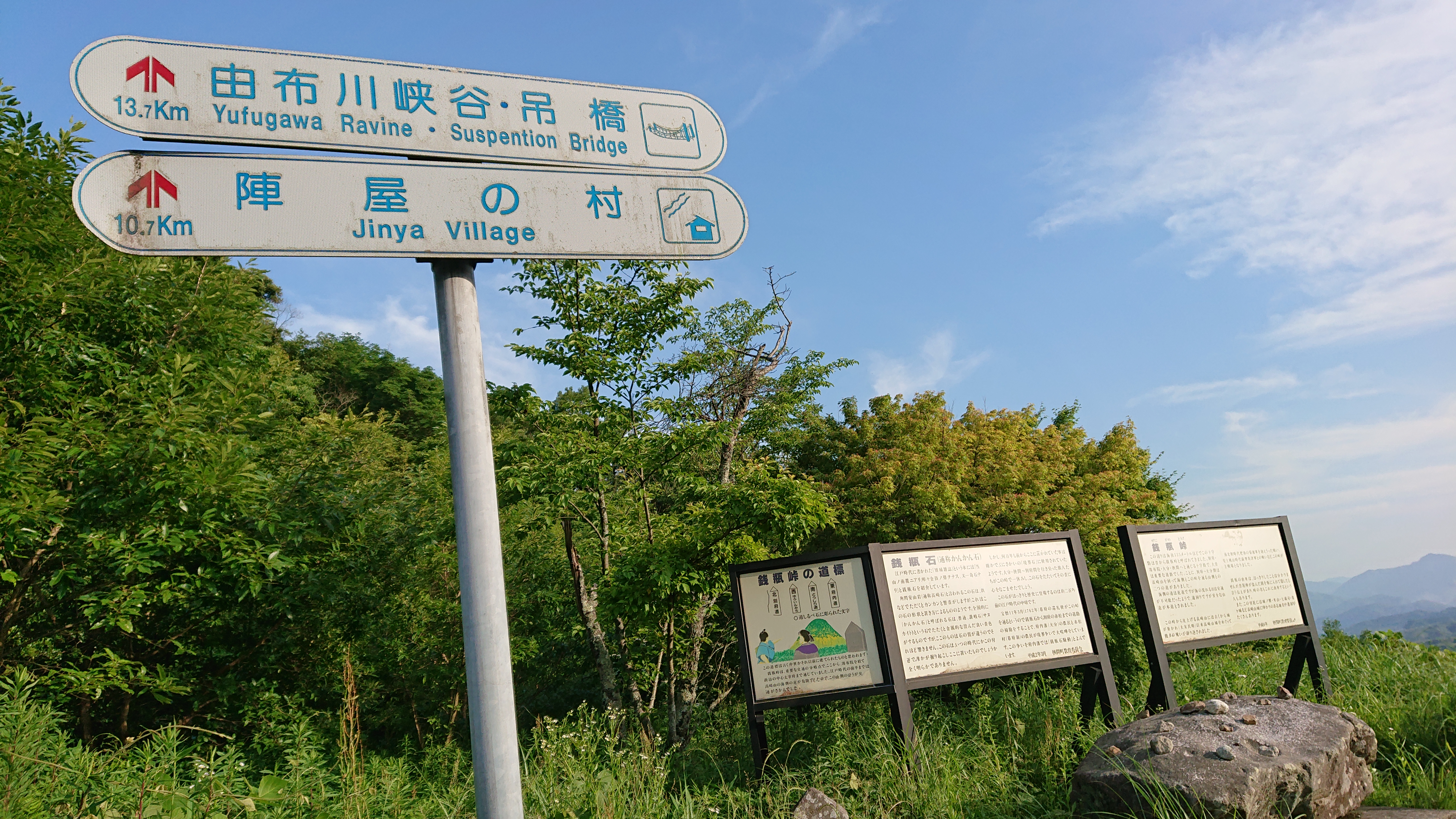 大分県の銭瓶峠にある案内標識・道標・銭瓶石（カンカン石）